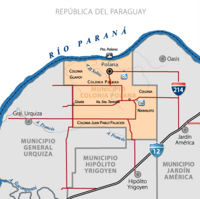 Mapa del Municipio de Colonia Polana, Provincia de Misiones, Argentina.